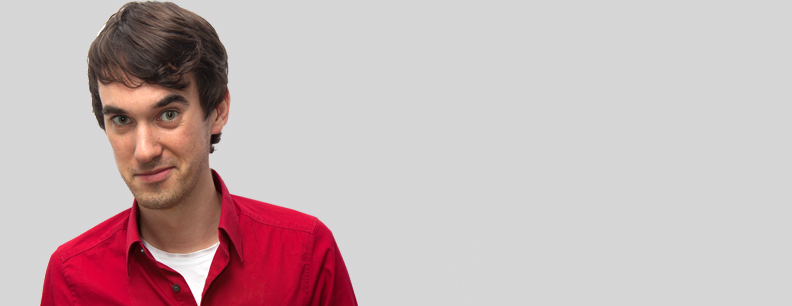 Michael Feindler (2012)